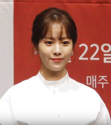 배우 한지민, 정해인이 20일 오후 서울 구로구 라마다 호텔에서 열린 MBC 드라마 '봄밤' 제작발표회에 참석했다.